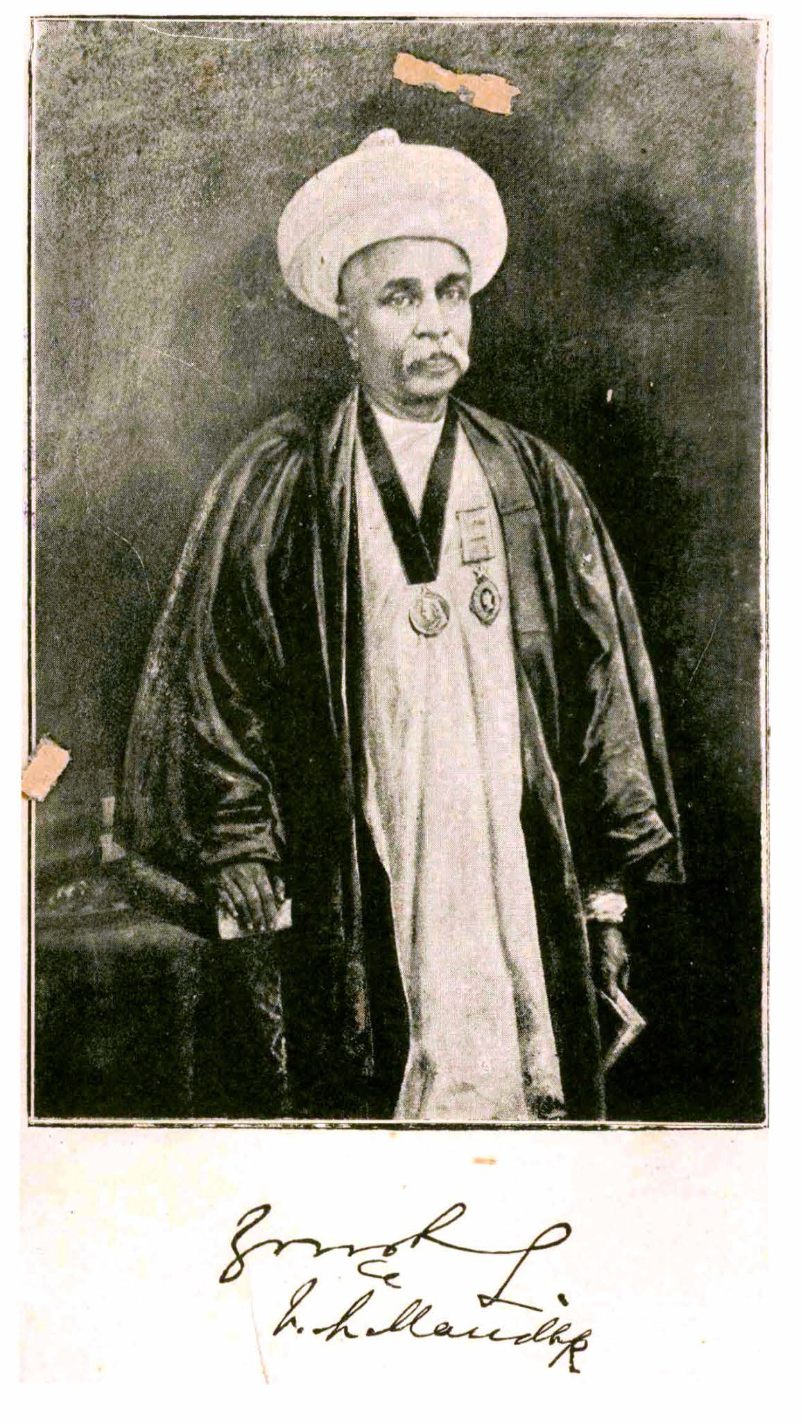 Vishvanath Narayan Mandlik, C.S.I. (8 March 1833 - 9 May 1899)